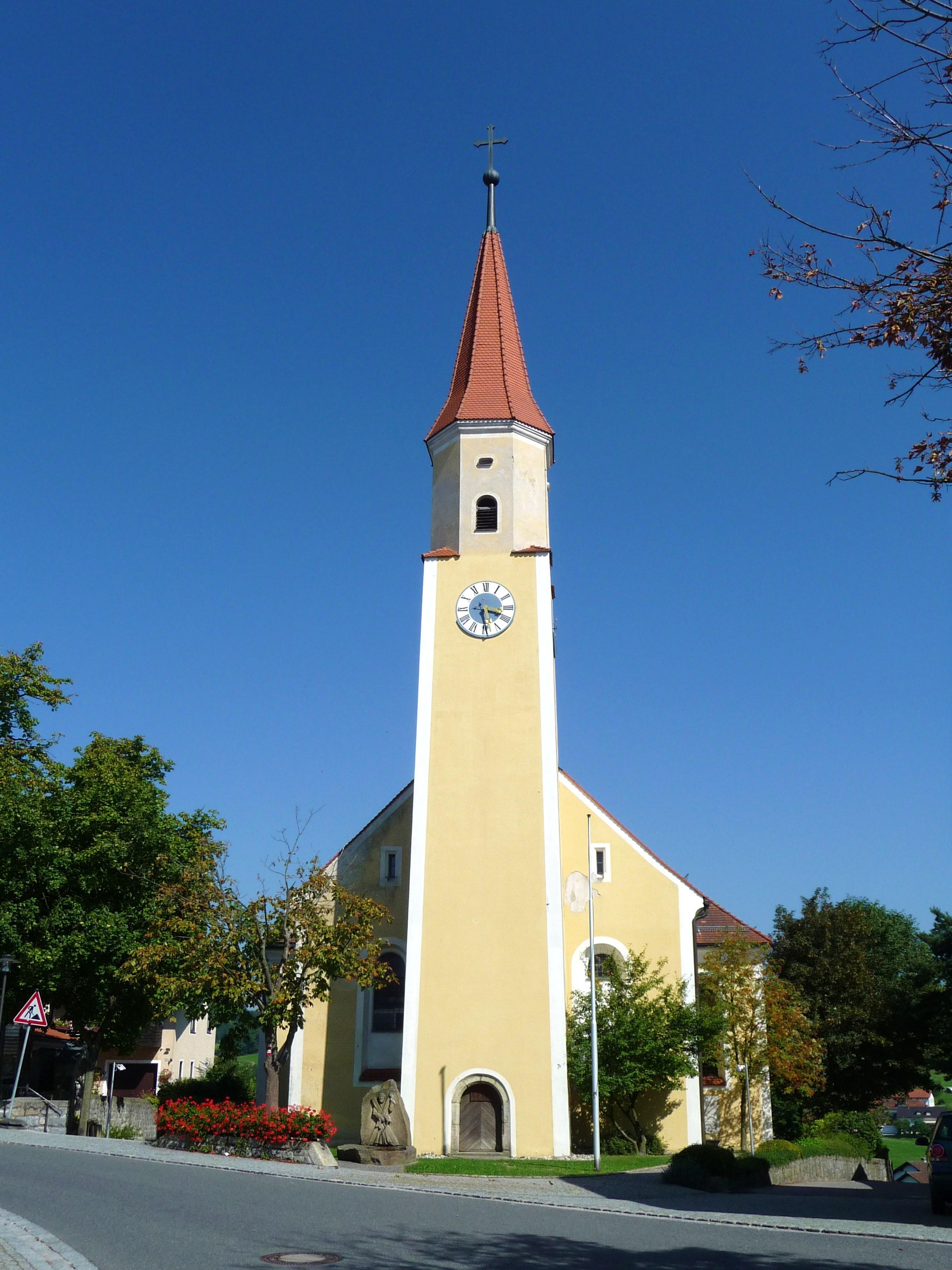 Die alte Kirche auf dem Dorfplatz von Runding